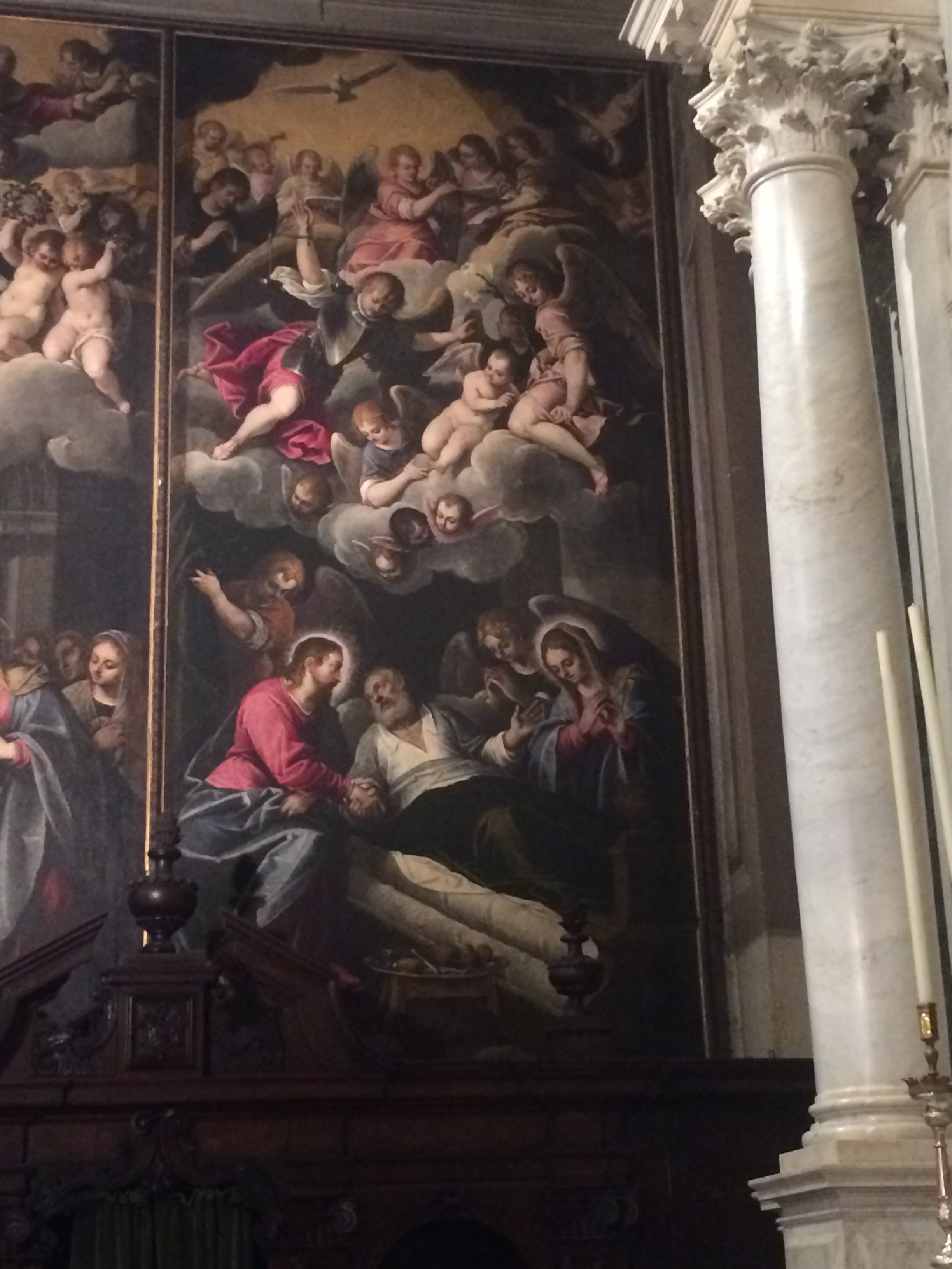 Udine - Duomo (Cappella di san Marco) - Maffeo Verona - Trapasso di san Giuseppe